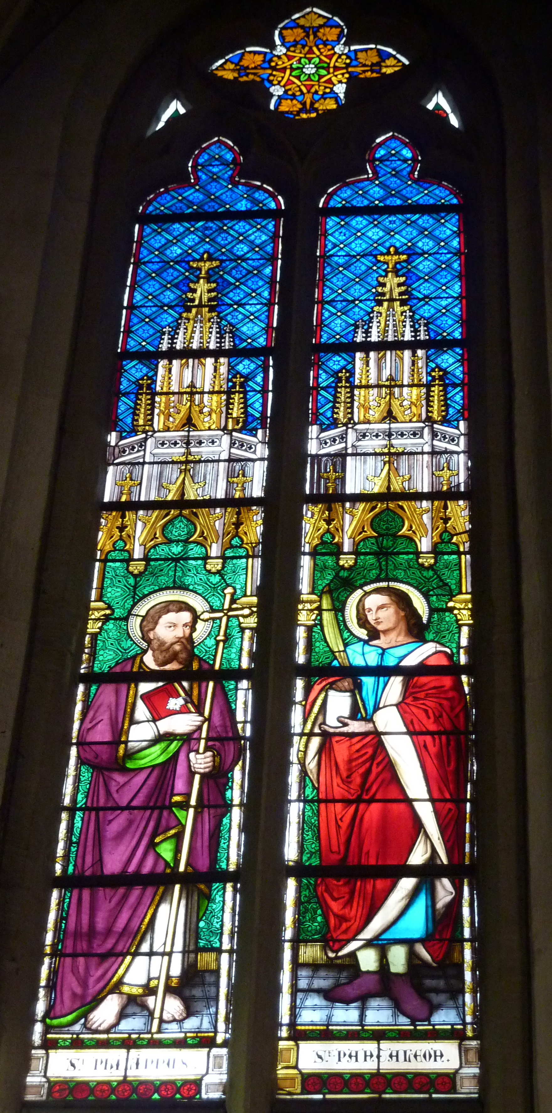 Bleiglasfenster in der katholischen Pfarrkirche St. Pantaleon in Unkel, Darstellung: hl. Philippus (links) und hl. Pantaleon (rechts)